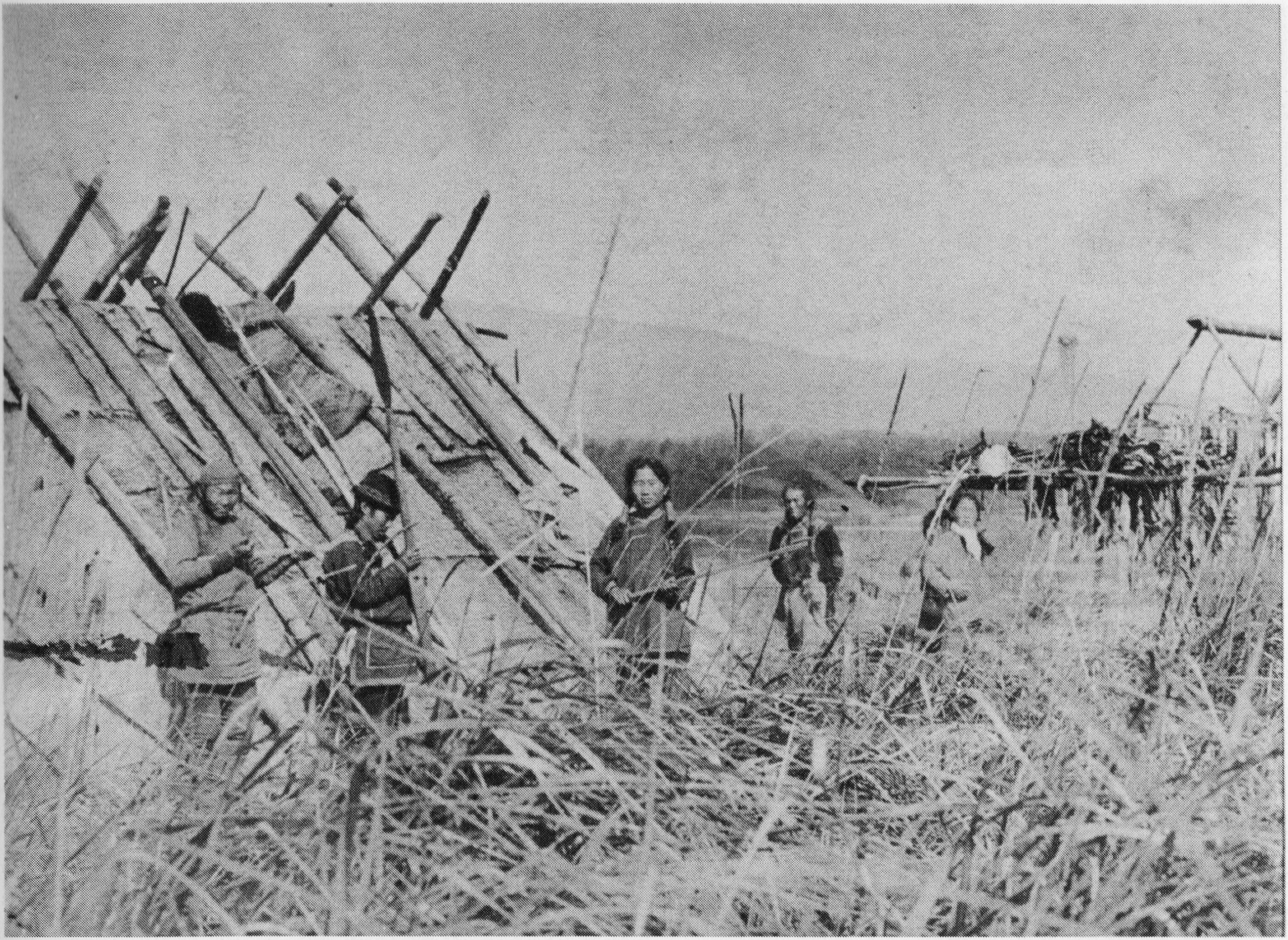 Фото из книги «Владимир Клавдиевич Арсеньев. Собрание сочинений в 6 томах». В книге подписано: «Один из первых фотоснимков удэгейского стойбища, сделанный В. К. Арсеньевым, с его автографом. 1906 г.».